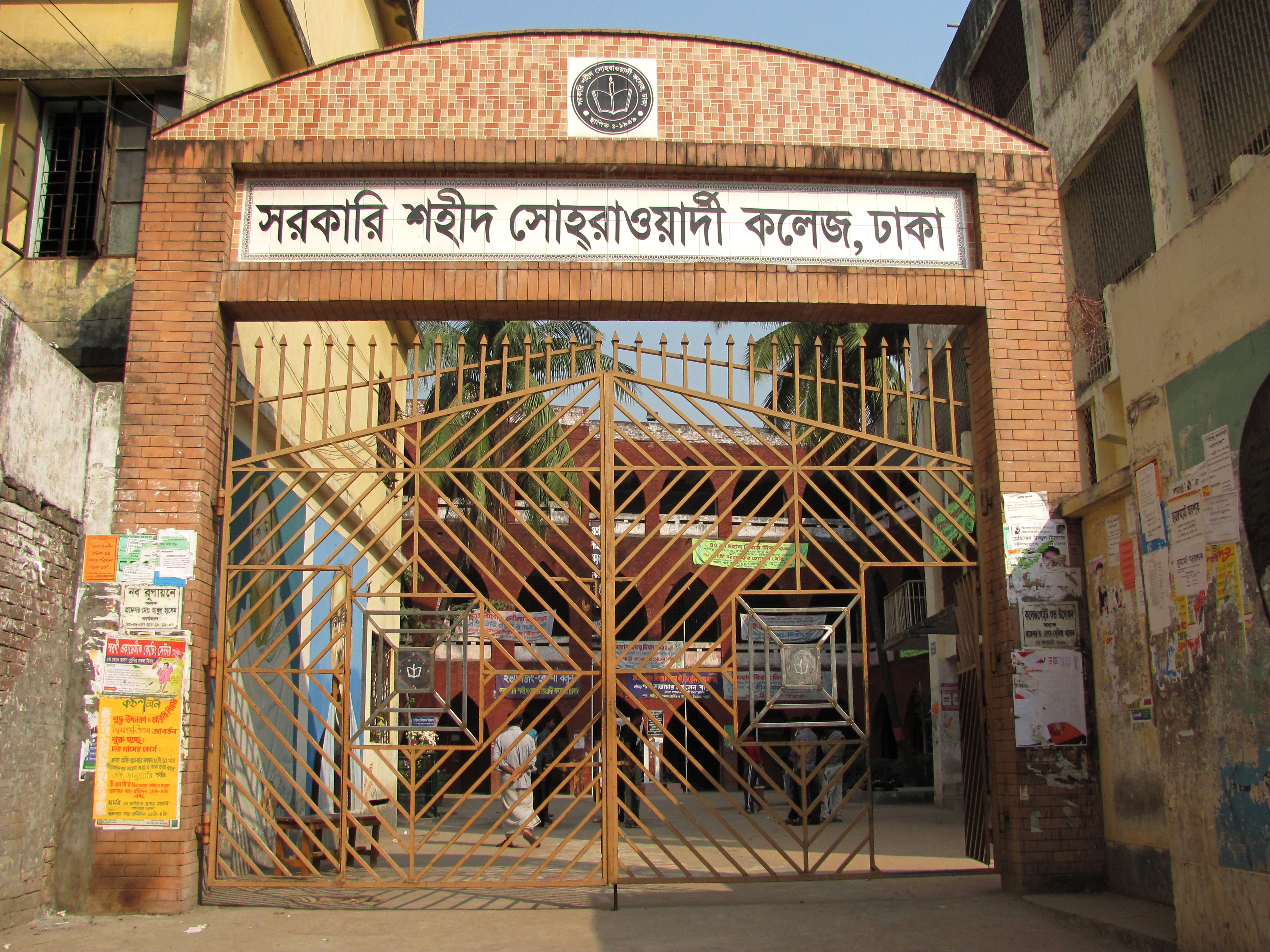 Govt Shahid Sohrawardi College Dhaka, Dhaka, Bangladesh.